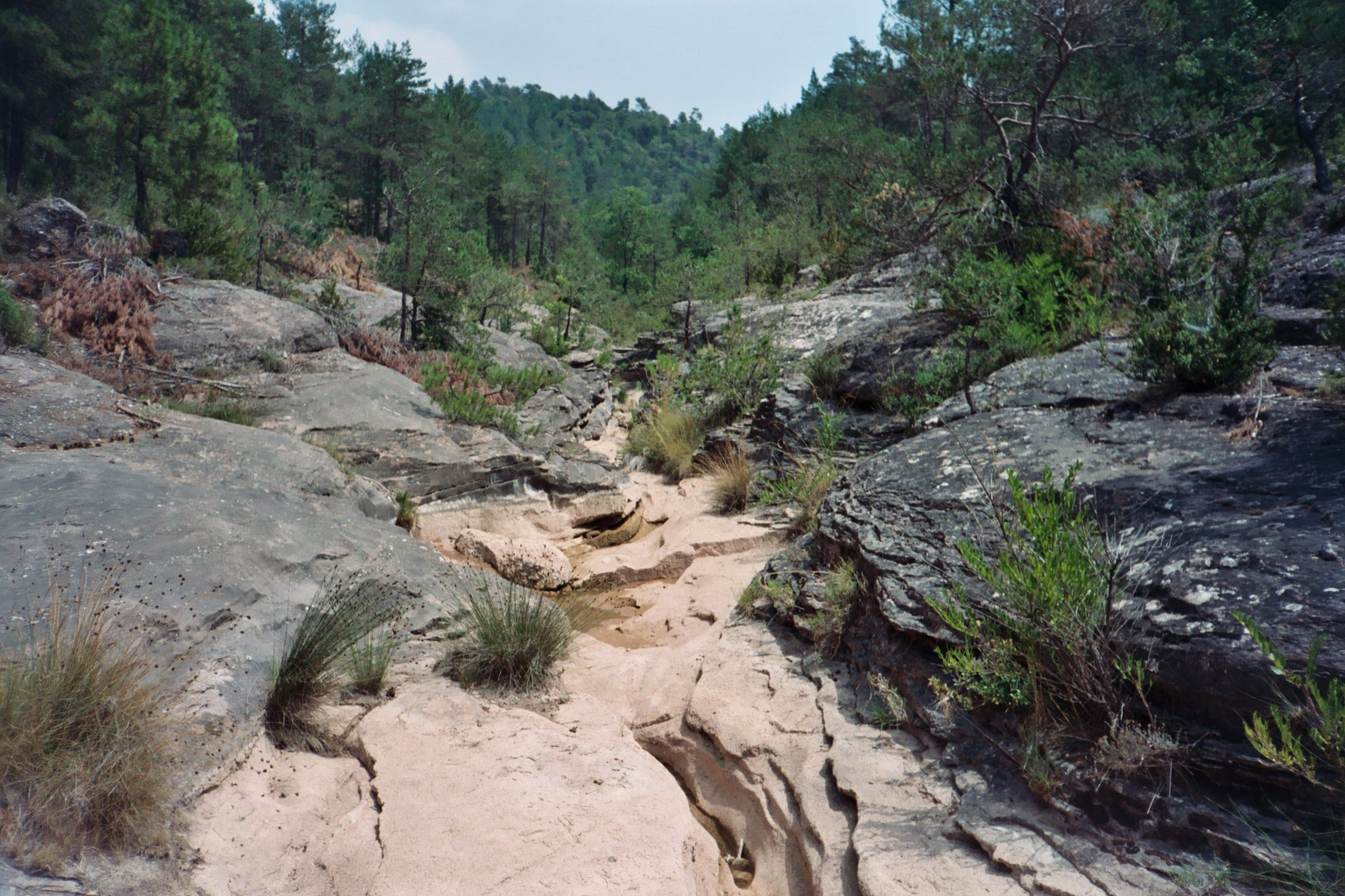 Torrent de l'Om (Monistrol de Calders, Moianès)